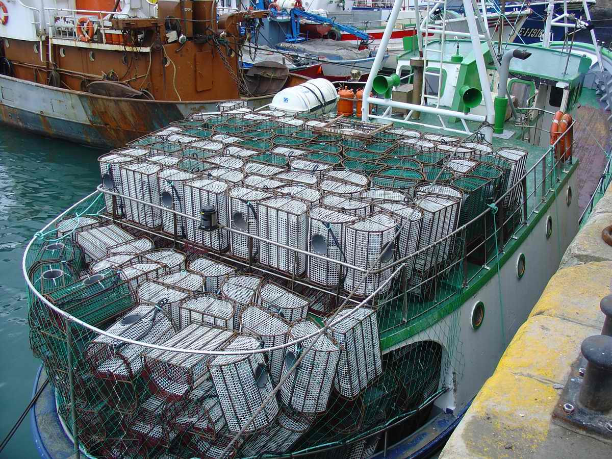 Nasas no buque Segundo Costa Brava, Viveiro, Galiza Ficha do Buque Nome do buque Lista Matrícula Folio SEGUNDO COSTA BRAVA 3 CO-4 1635 RBPCAG 1992CO002456 Estado Alta Porto base Burela Caladoiro/Tipo de pesca CALADOIRO NACIONAL PALANGRE FONDO Artes PALANGRE DE FONDO Ano construción 1976 Data entrada en servizo 01/12/1976 Arqueo TRB 42,78 Arqueo GT 39,00 Eslora total 18.40 M. Eslora PP 16.03 M. Potencia 230.00 CV. Material casco Madeira